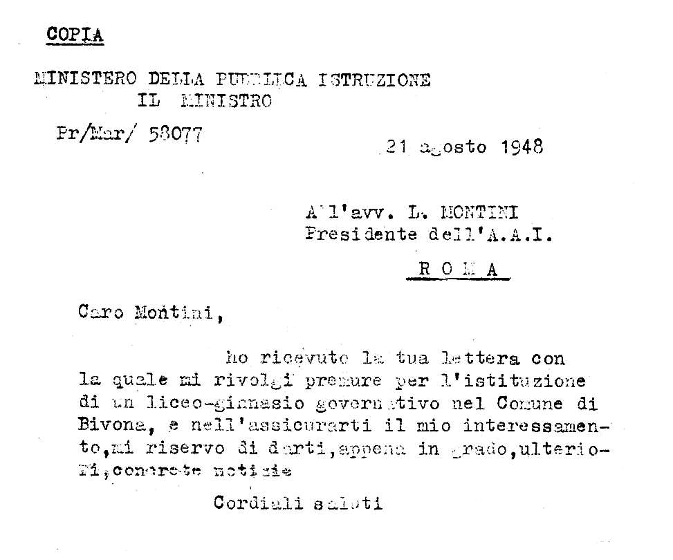 Documento liceo Bivona